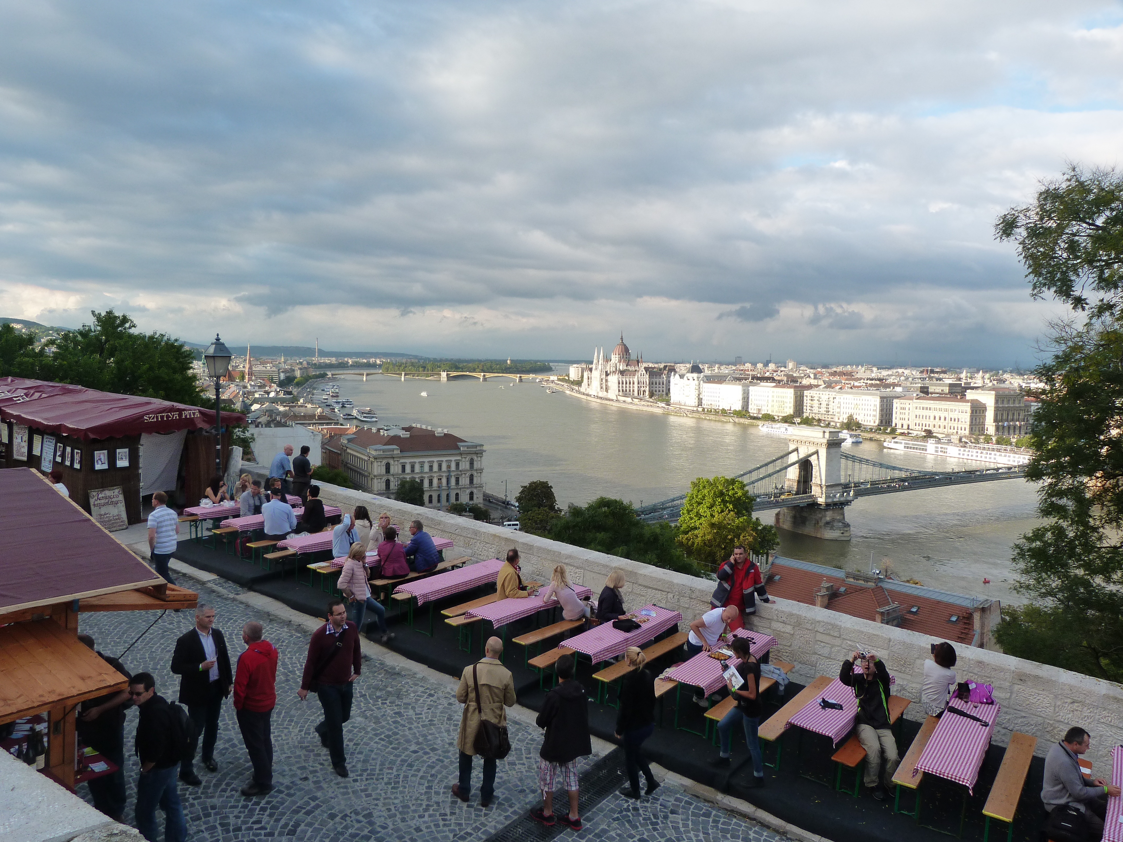 A felvétel 2014. szeptember 12-én, pénteken készült Budapesten, a 23. Budavári Borfesztiválon. Kilátás a várból. Források Bor és Pia borpiaci szakmai magazin 2014. augusztus Borfesztivál Melléklet 23. Budavári Borfesztivál kiállítási tájékoztató ©© Derzsi Elekes Andor, Budapest, 2014, A kép és filmfelvételek egészben, vagy részletekben másolását, bármilyen úton történő sokszorosítását és felhasználását a szerző ellenérték nélkül, jogutódjaira is kihatóan megengedi. Az engedély kiterjed a kereskedelmi célú hasznosításra is. Kéri azonban nevének feltüntetését a felhasználás során. A Metapolisz sorozat valamennyi képe és filmje Creative Commons alatti valamint kereskedelmi - for profit - célra is felhasználható. Ajánlott hivatkozás: Derzsi Elekes Andor: Metapolisz DVD line